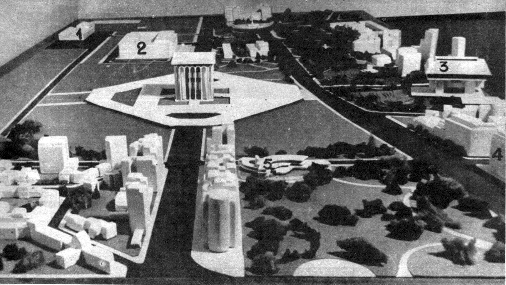 Proyecto del Altar de la Patria en las cercanías de la Facultad de Derecho (Buenos Aires)